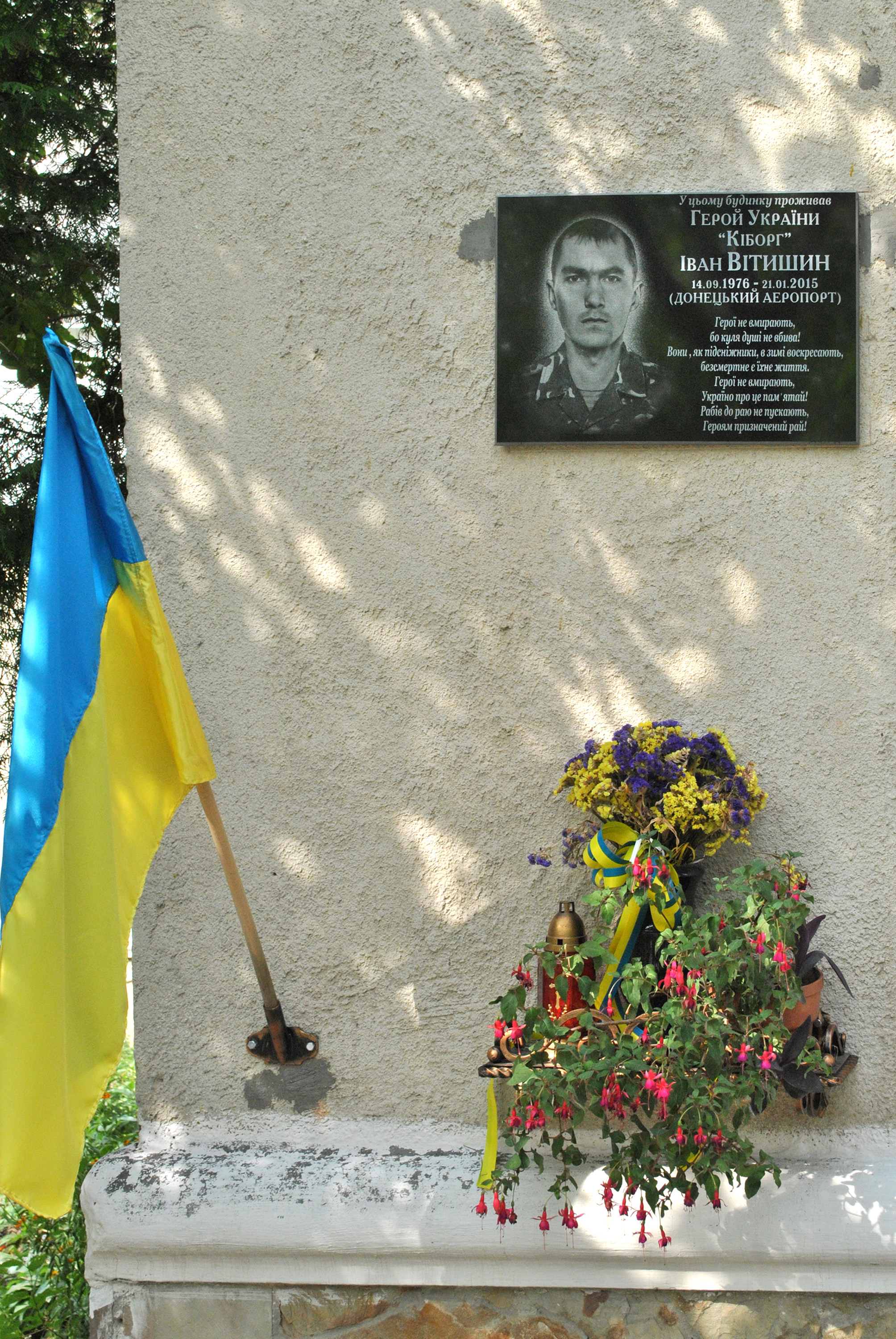 Пам'ятна дошка українському військовикові 80-ї окремої аеромобільної бригади Іванові Вітишину на стіні будинку №15 на вул. Енергетичній (де проживав) у Великій Березовиці Тернопільського району Тернопільської області.